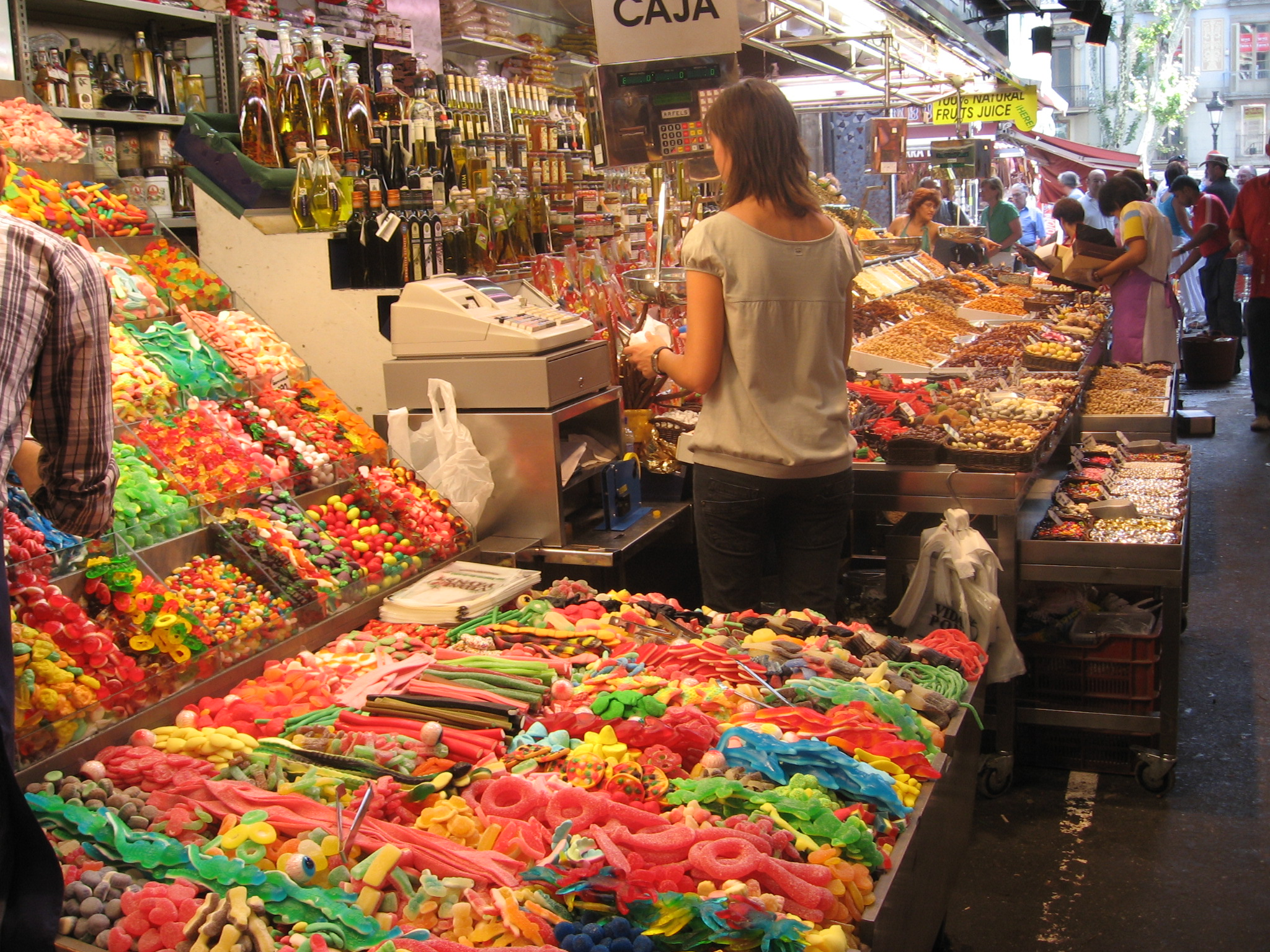 Mercat de la Boqueria, sweets and dried fruits